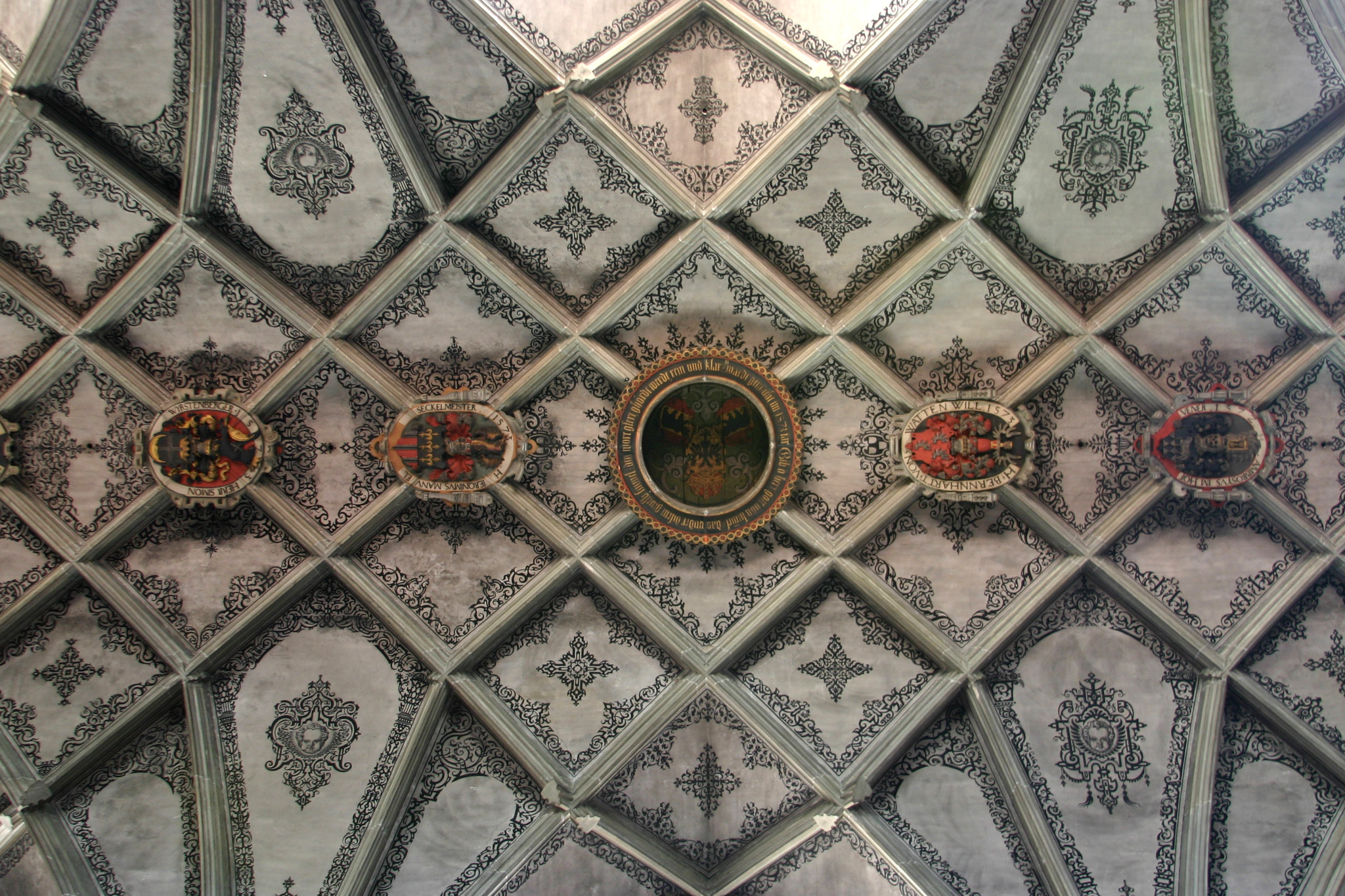 Münster, Bern, Schweiz